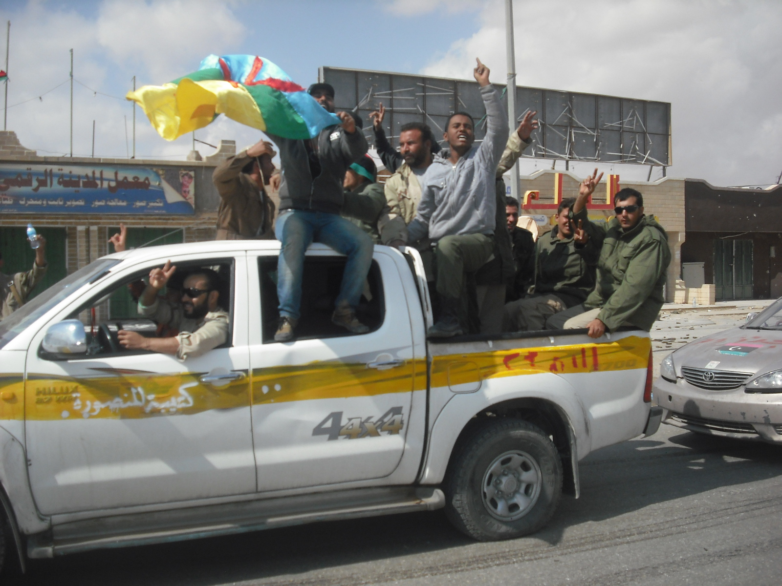 [Essam Mohamed] From Bani Walid to Benghazi and Tripoli, residents cheer as news of Kadhafi's capture and death swirled across the world. من بني وليد إلى بنغازي، احتفل الليبيون مع تناقل العالم نبأ القبض على القذافي ووفاته De Bani Walid à Benghazi et à Tripoli, les Libyens se réjouissent alors que la nouvelle de la capture et de la mort de Kadhafi se propage dans le monde entier.